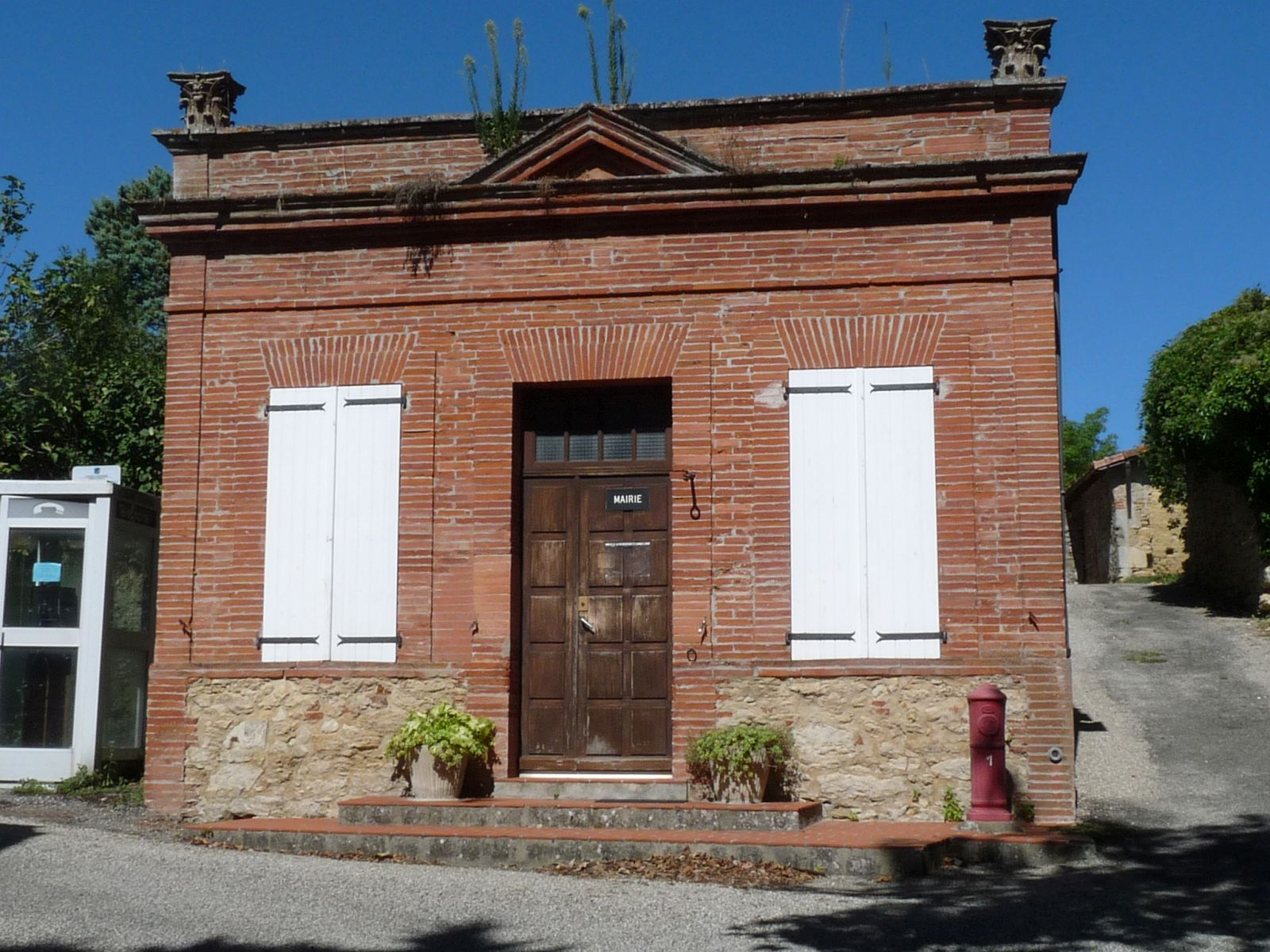 Mairie de Saint-Vincent, Haute-Garonne, France